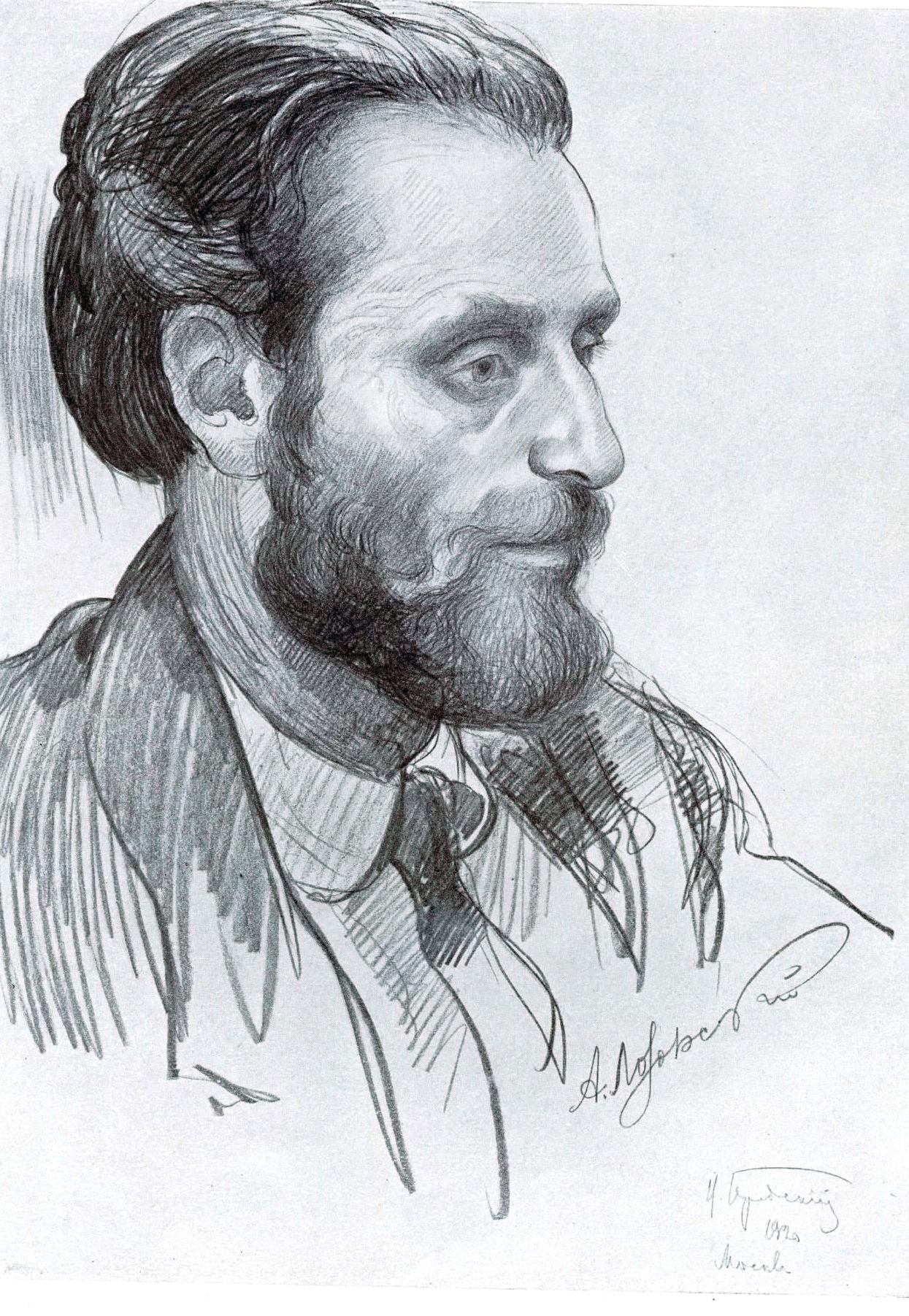 Лозовский, Соломон Абрамович